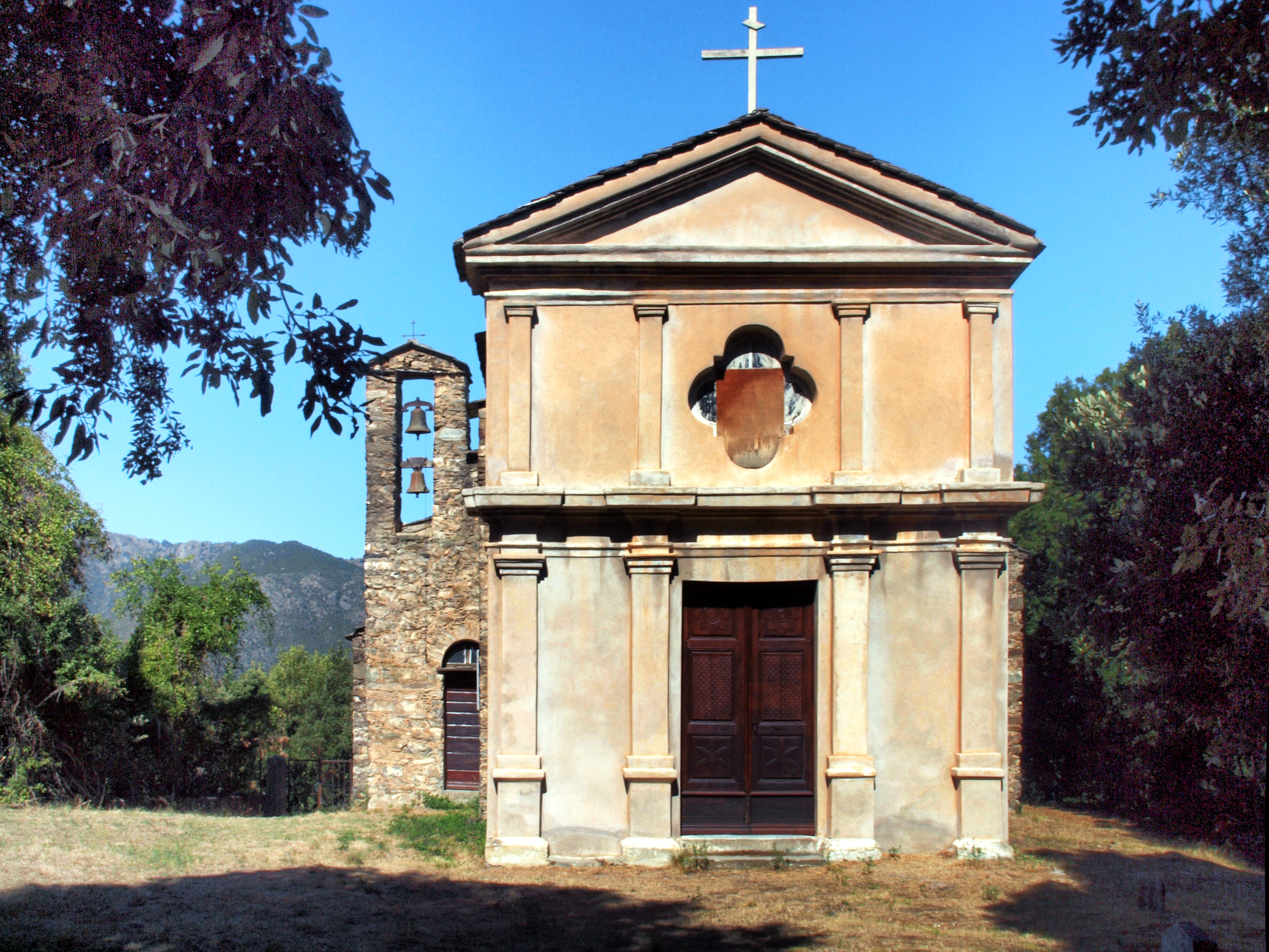 Érone, Casaluna (Corse) - L'église paroissiale San Martino